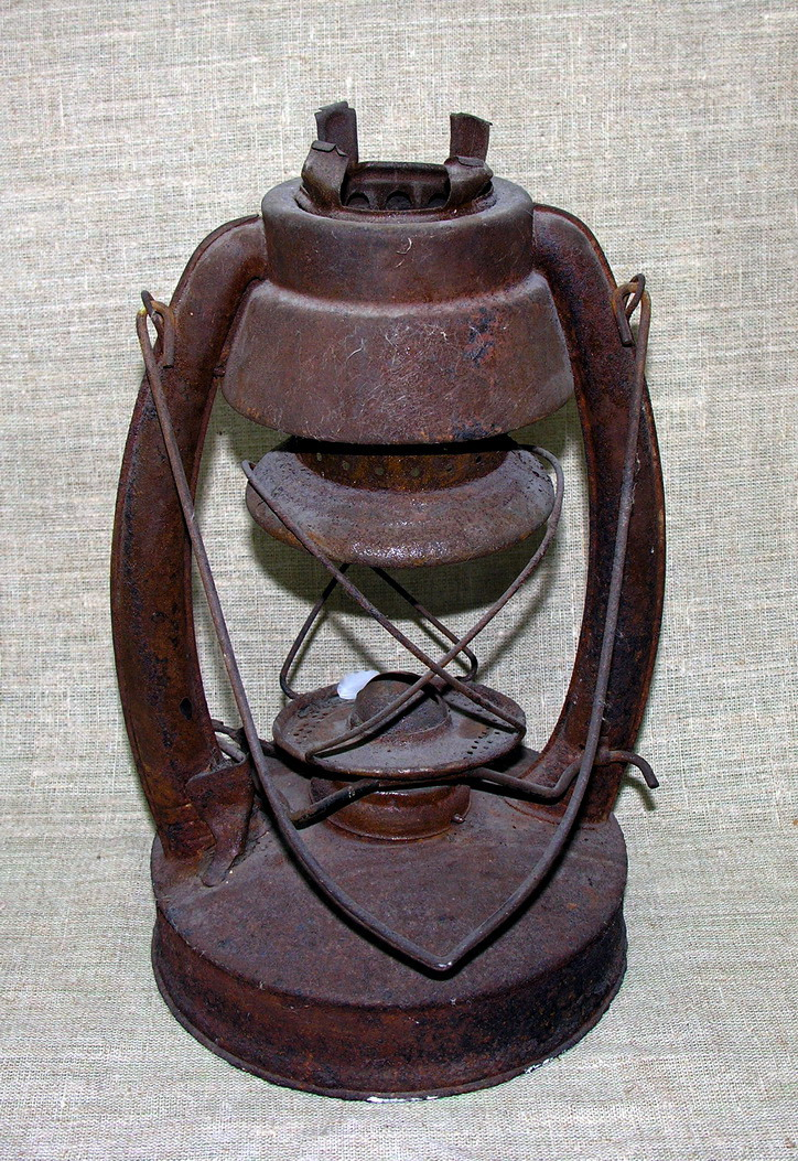 Žibintas 2008 m. kovo 4 d., Lietuva